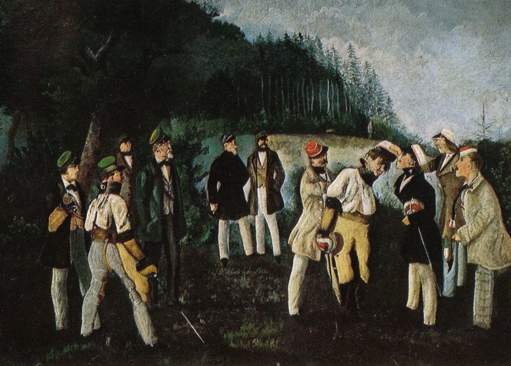 Pro-Patria-Suite des Corps Onoldia vs. Corps Baruthia, Partie mit Korbschlägern vor Beginn oder während der Pause. Ölbild (?) ohne Quellenangabe. Die Paukanten tragen Mützen, hohe Fechthandschuhe, Halsbinden, keine Paukbrillen